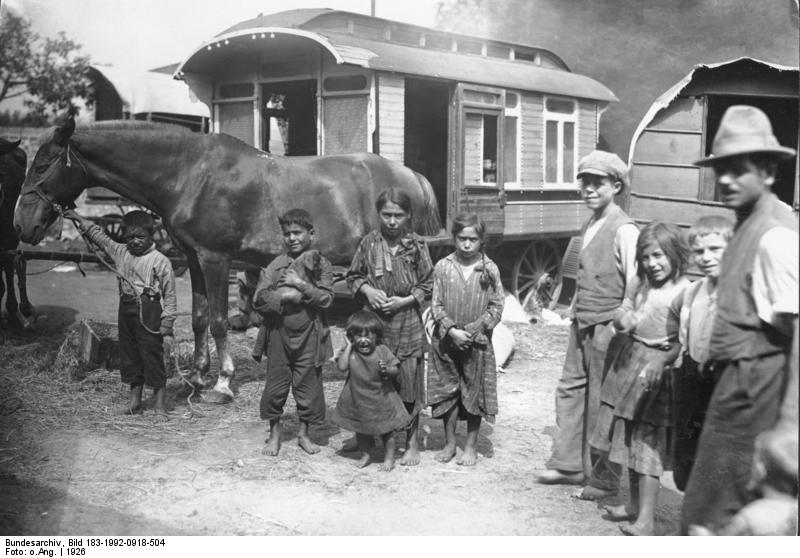 Zigeunerplage in Berlin. Die Zigeuner, die im Sommer als Pferdehändler, Kammerjäger u.s.w. durch das Land ziehen, haben im Norden Berlins ein Winterquartier, in dem sie sich nicht etwa wie dankbare Gäste benehmen, sondern zu einer wahren Plage werden. Die Fälle von Betrug, Diebstahl und Schlimmerem mehren sich derart, dass die Polizei den braunen Vagabunden immer grössere Aufmarksamkeit schenkt. Vor dem Wohnwagen. 1926